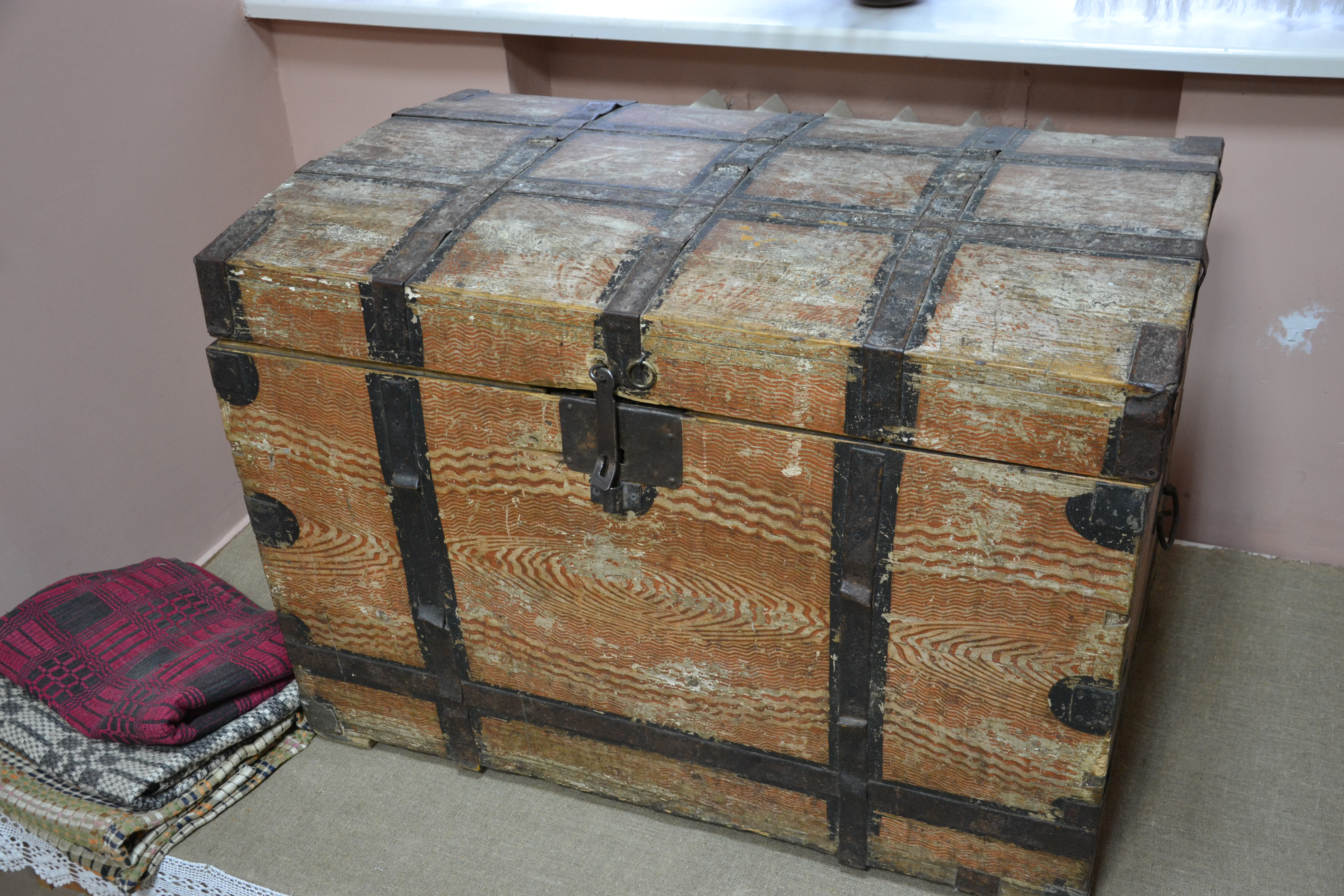 Куфар у Лідскім гісторыка-культурным музеі